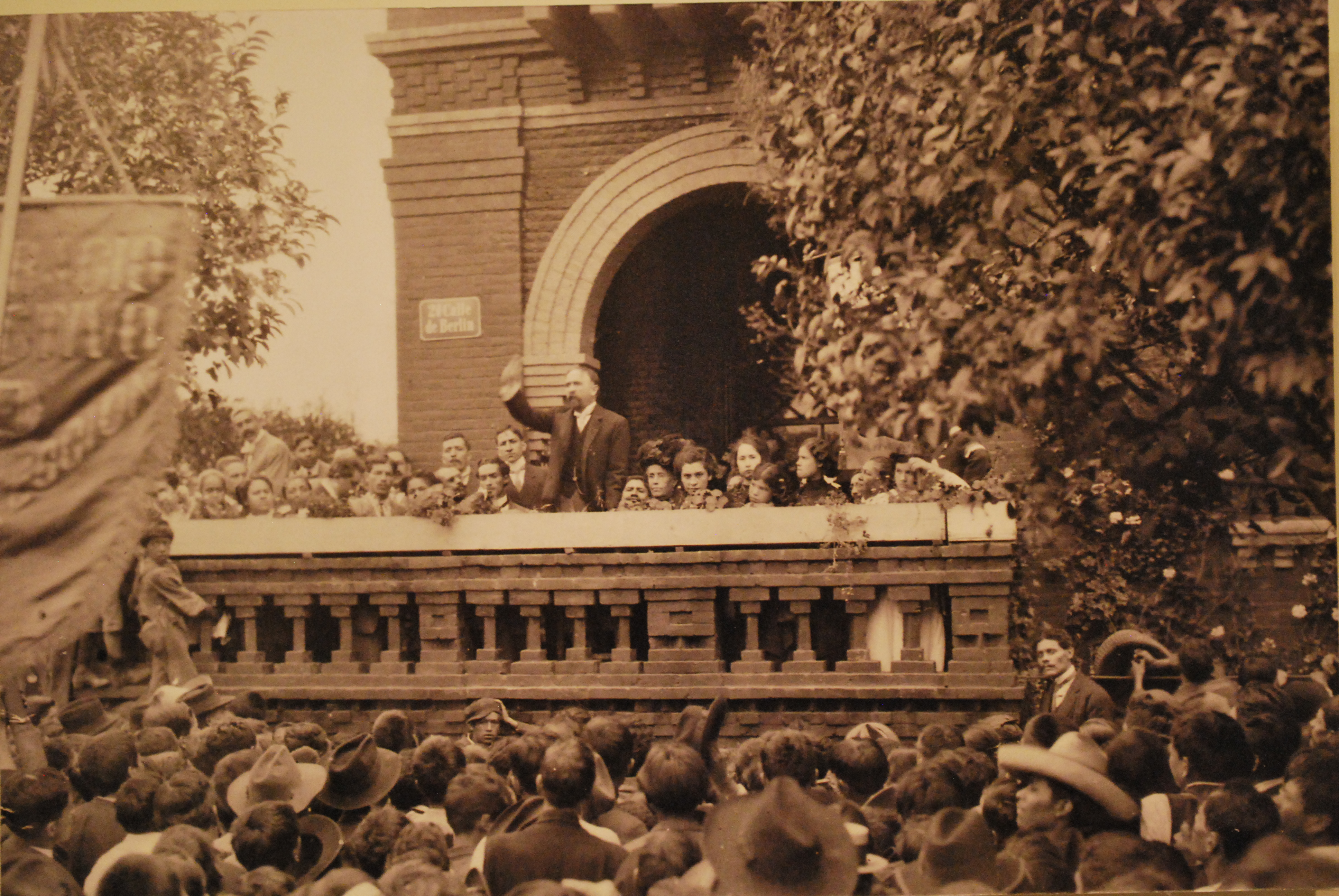 photograph of Francisco I. Madero campaigning from 1910 on display at the Museo del Objeto del Objeto